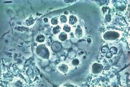 Animalculos protozoarios recogidos en la biopelicula microbiana de un surco ginfival enfermo. Son amebas que se rreconocen por su nucleo denso, formado por un punto central rodeado por un halo circular y vacuolas digestivas mas voluminosas dentro de un citoplasma grisaceo.